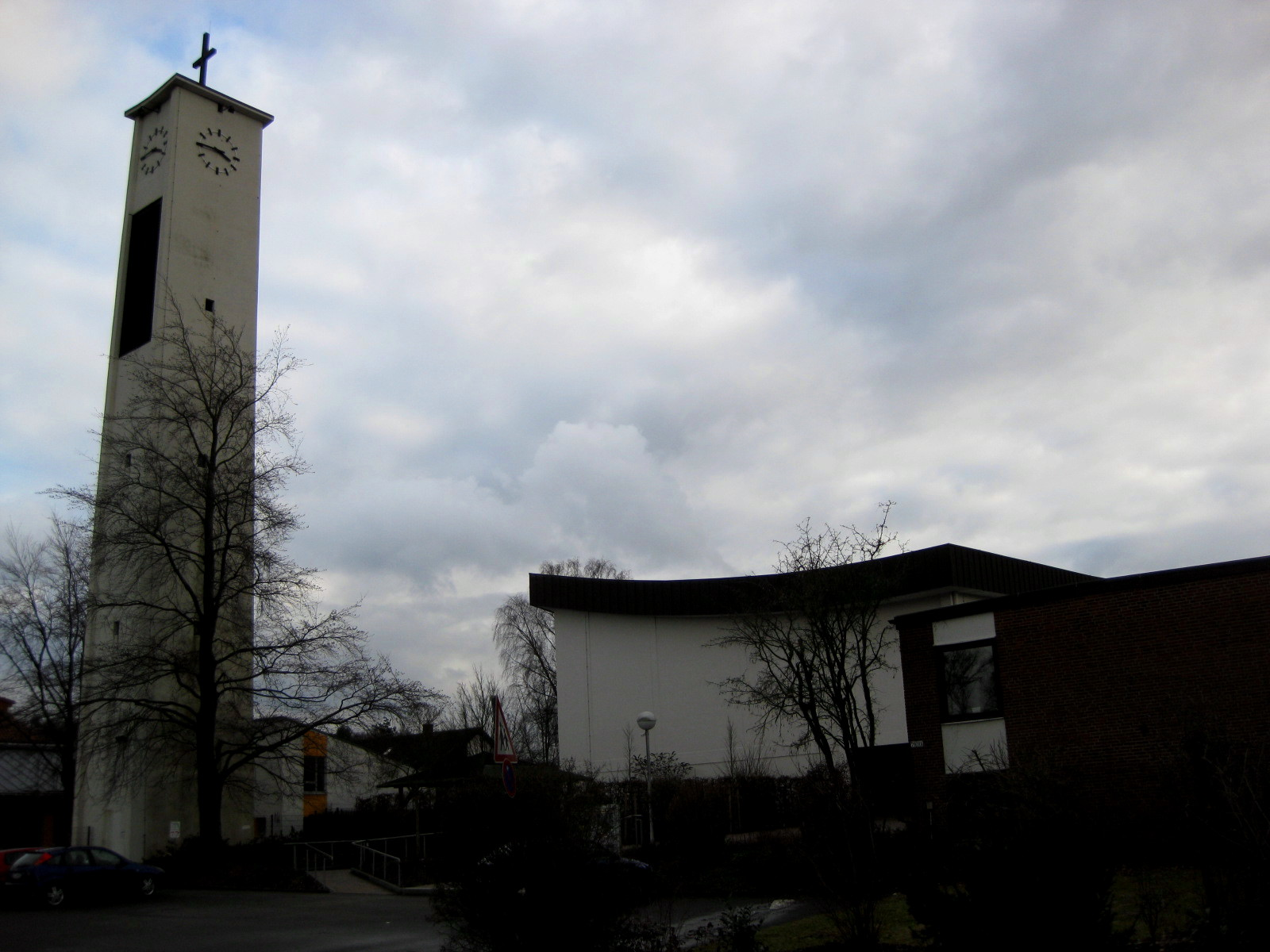 Evangelisch-lutherische Margaretenkirche im Osnabrücker Stadtteil Voxtrup